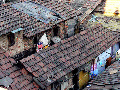 From English Wikipedia.